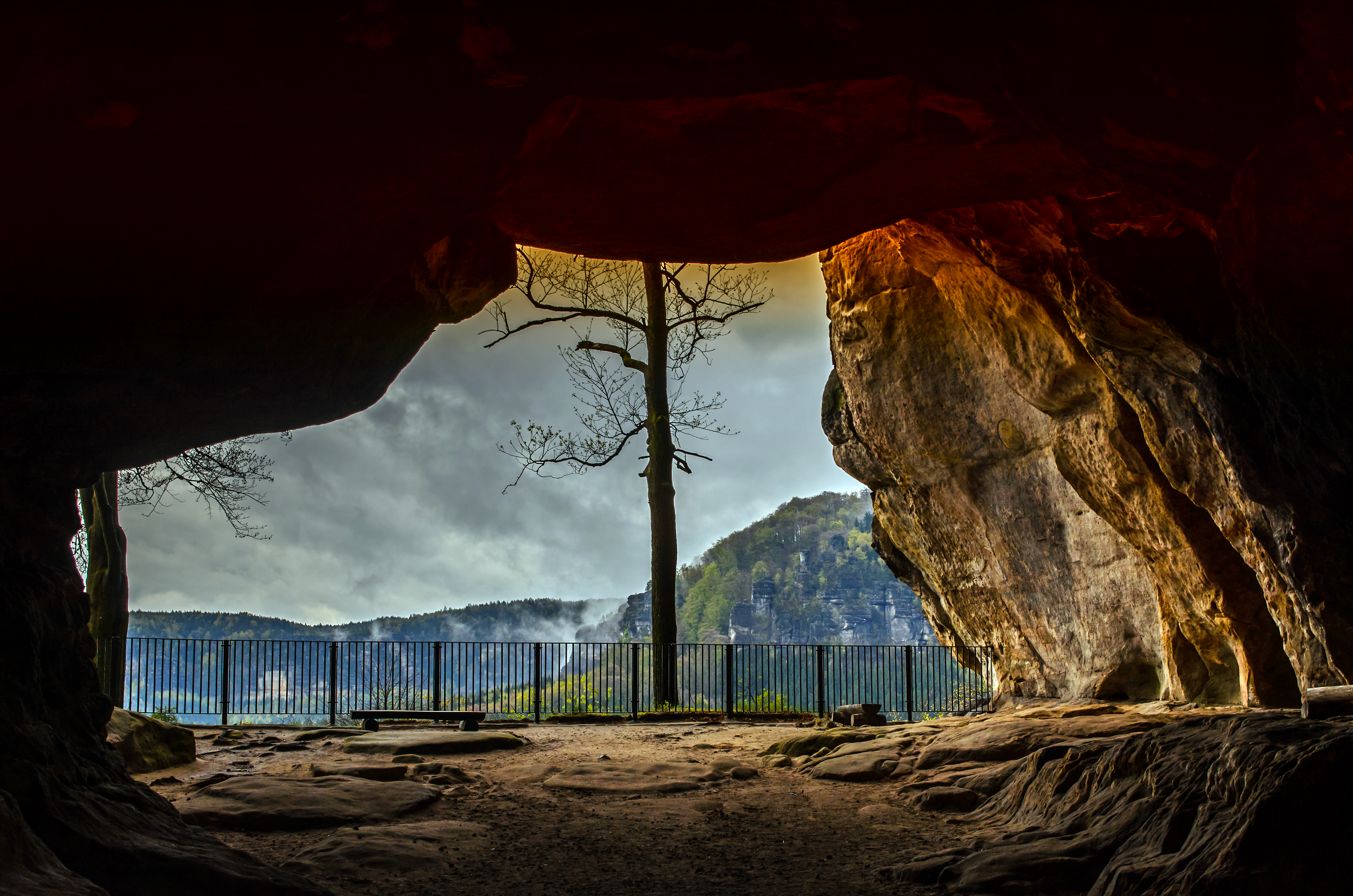 Aussichtsplattform Kuhstall im Nationalpark Sächsische Schweiz